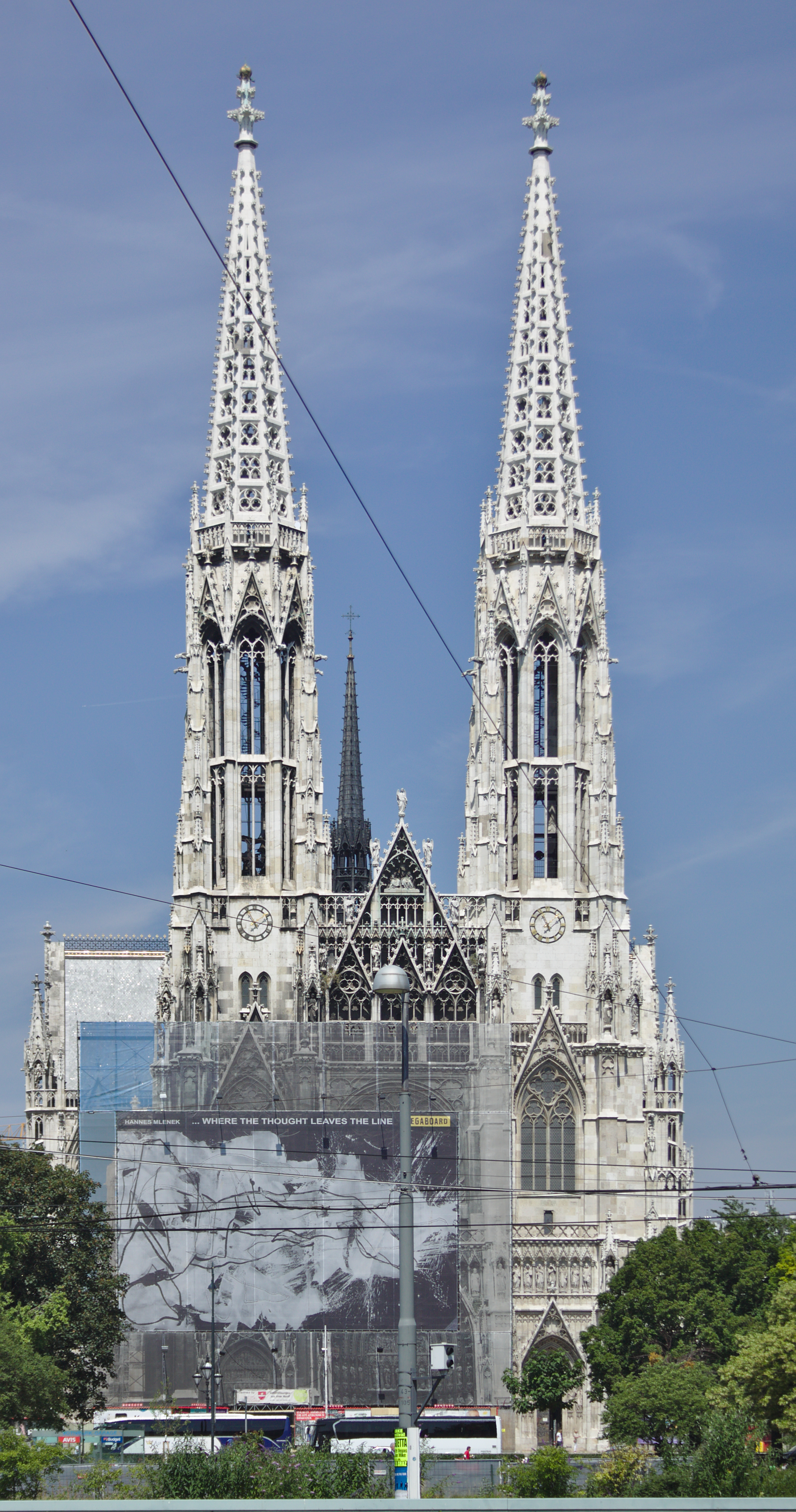 Kath. Pfarrkirche, Votivkirche, Propsteikirche zum Göttlichen Heiland